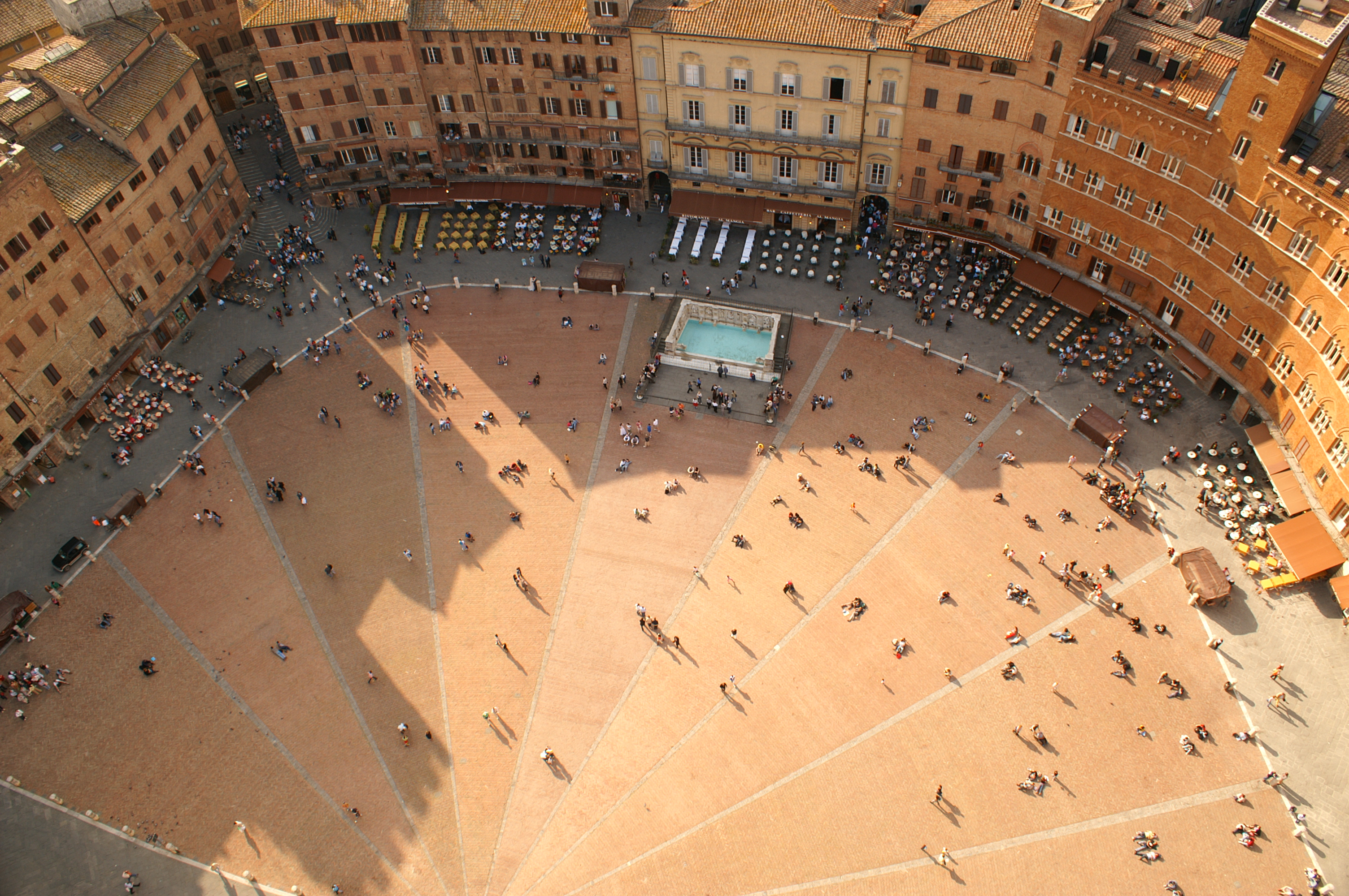 Die Piazza del Campo in Siena mit der kurzen Eingangspforte "Costarella dei Barbieri" zum Platz von der Hauptstrasse "Via di Città" hinter den Palazzi und hohen Häusern am Stadtplatz.